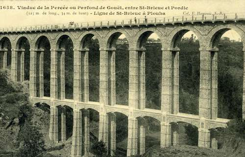 Le viaduc du Parfond du Gouët des Chemins de Fer des Côtes-du-Nord